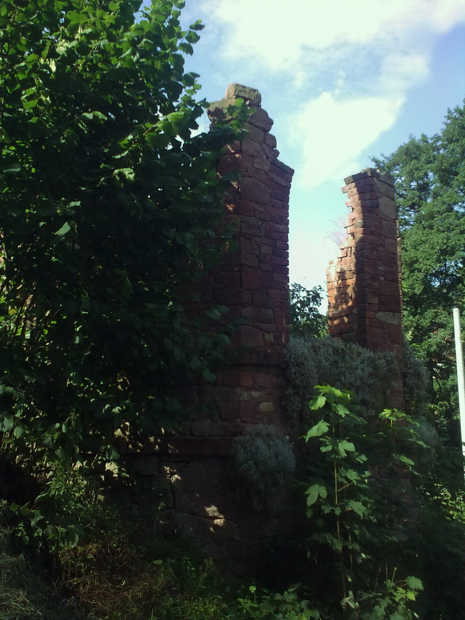 Krajanów. Ruiny baszty przy zespole dworskim